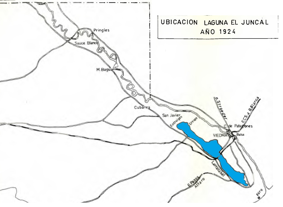 Croquis realizado en 1981 y publicado en un artículo del INTA (órgano gubernamental agrícola argentino) en base a testimonios de cómo fue la laguna previo a su desecación (1924). El artículo en cuestión se denomina "De la laguna El Juncal a las chacras del IDEVI".